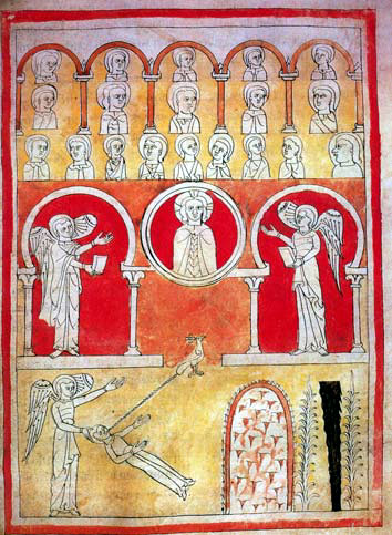 Fólio do Apocalipse do Lorvão